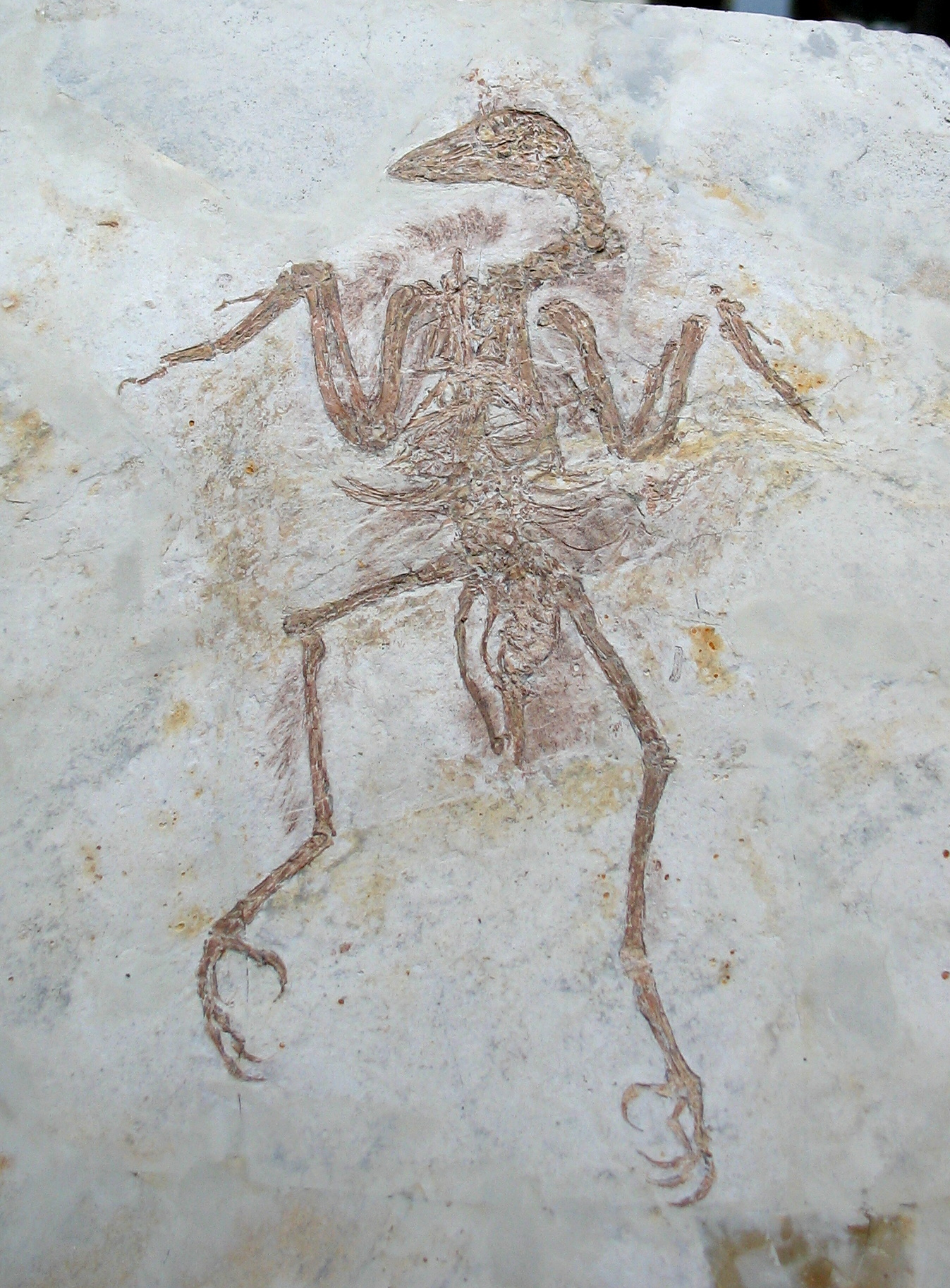 ?Liaoxiornis delicatus. Cretácico Inferior de Liaoning, China. Ejemplar del Museo Geominero de Madrid.